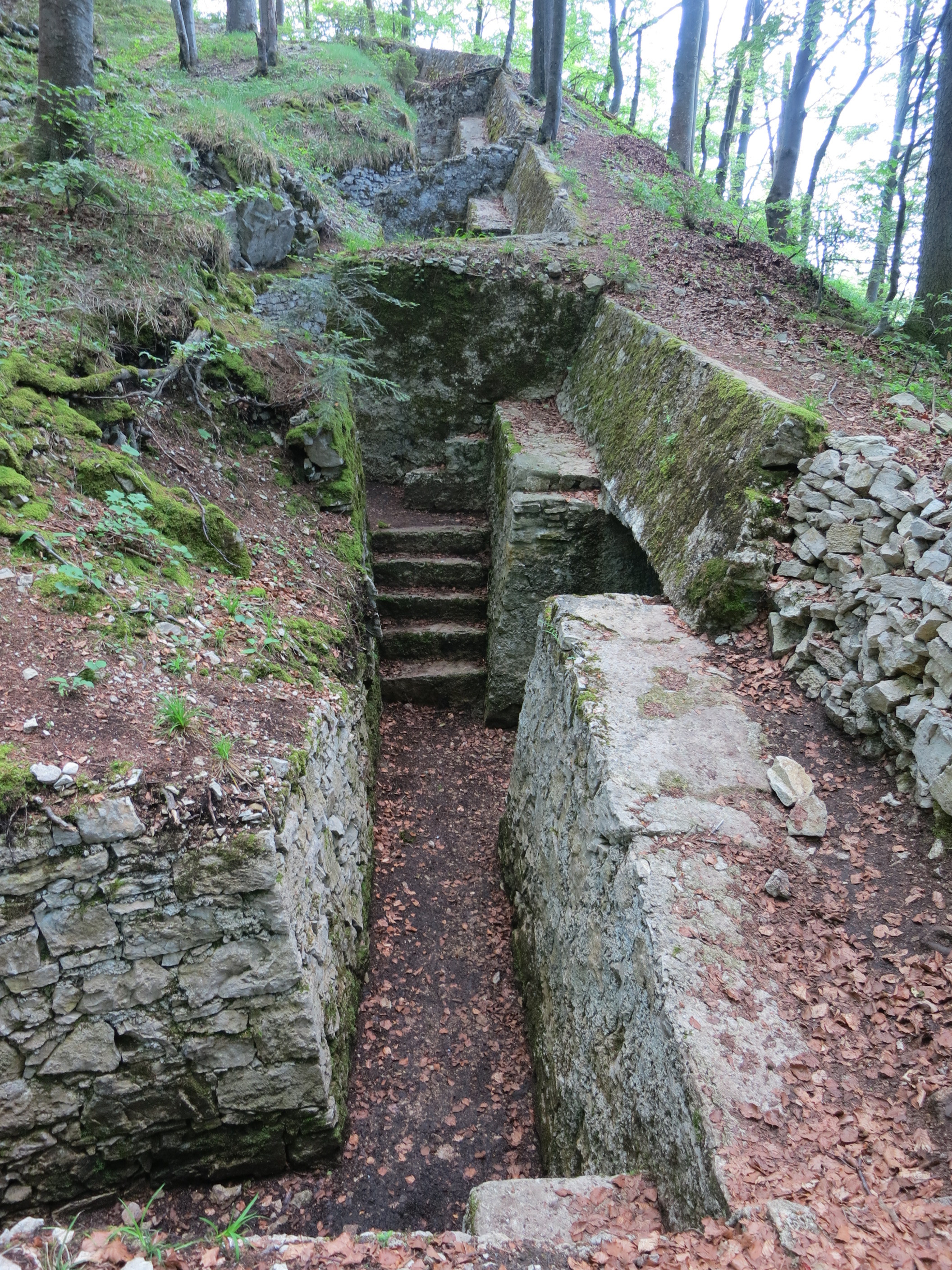 Schützengraben Spitzflüeli, Basel-Landschaft, Schweiz